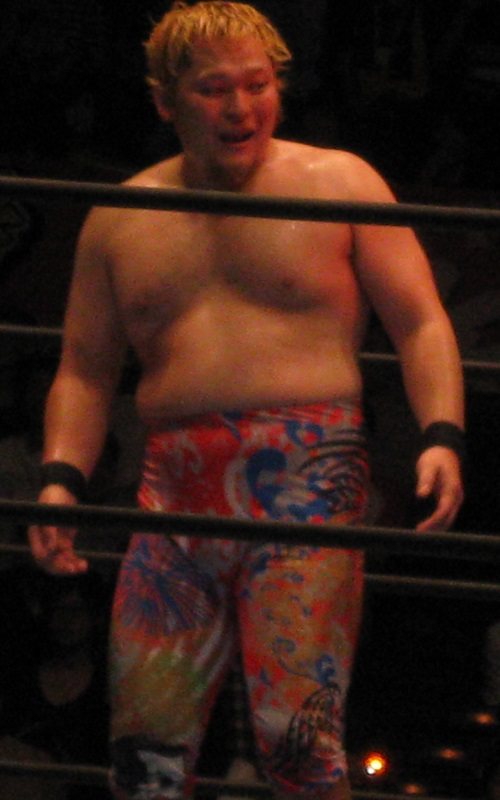 9月29日 神戸大会 「DESTRUCTION」 矢野通